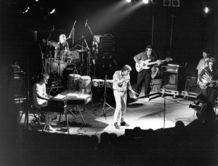 Polo Hofer, Schweizer Musiker, bei einem Auftritt mit Band